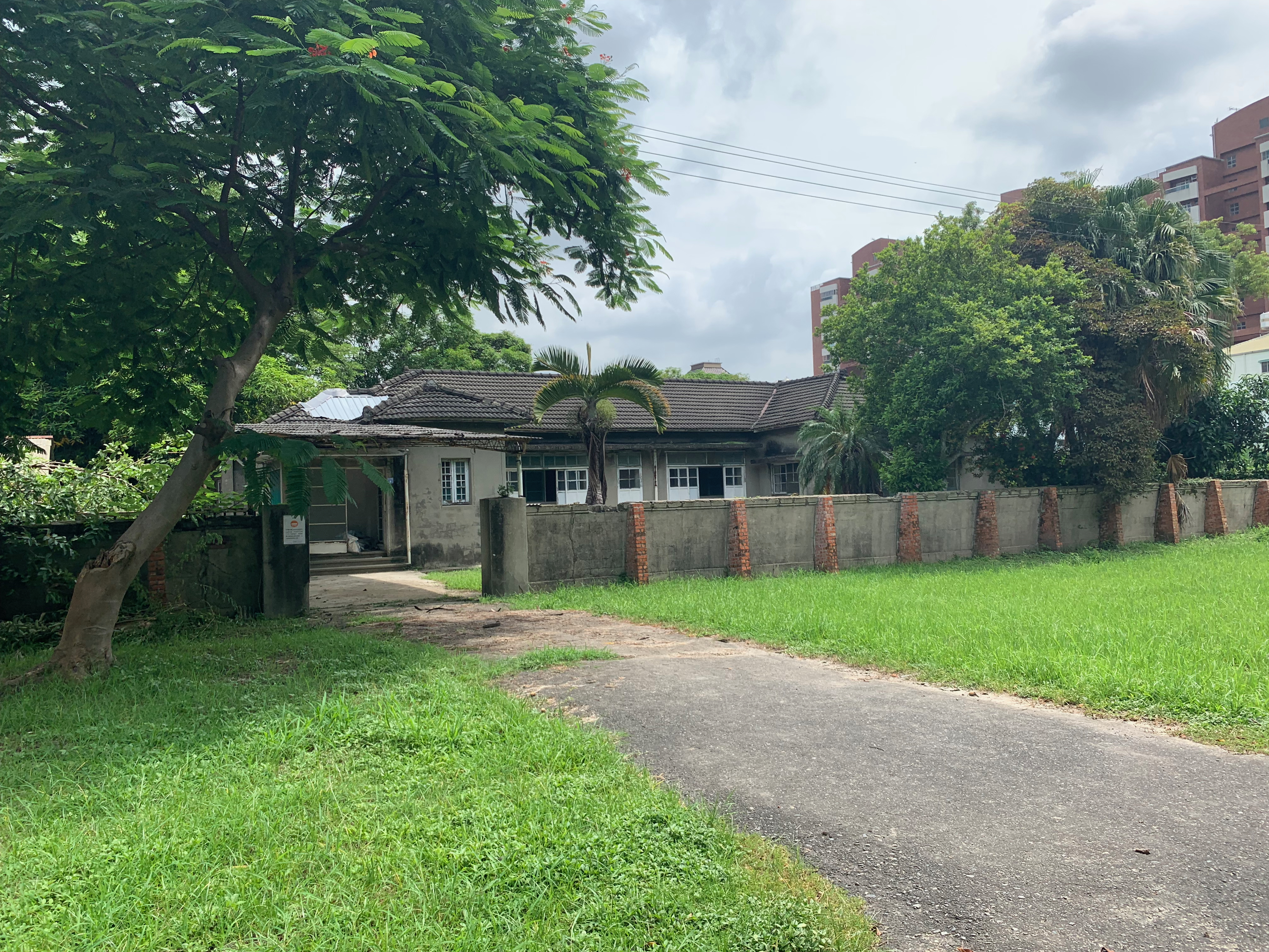 高雄市定古蹟原岡山日本海軍航空隊編號A1~A16宿舍群（樂群村）官舍